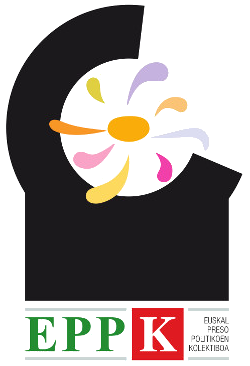 EPPK - Euskal Preso Politikoen Kolektiboaren logotipoa